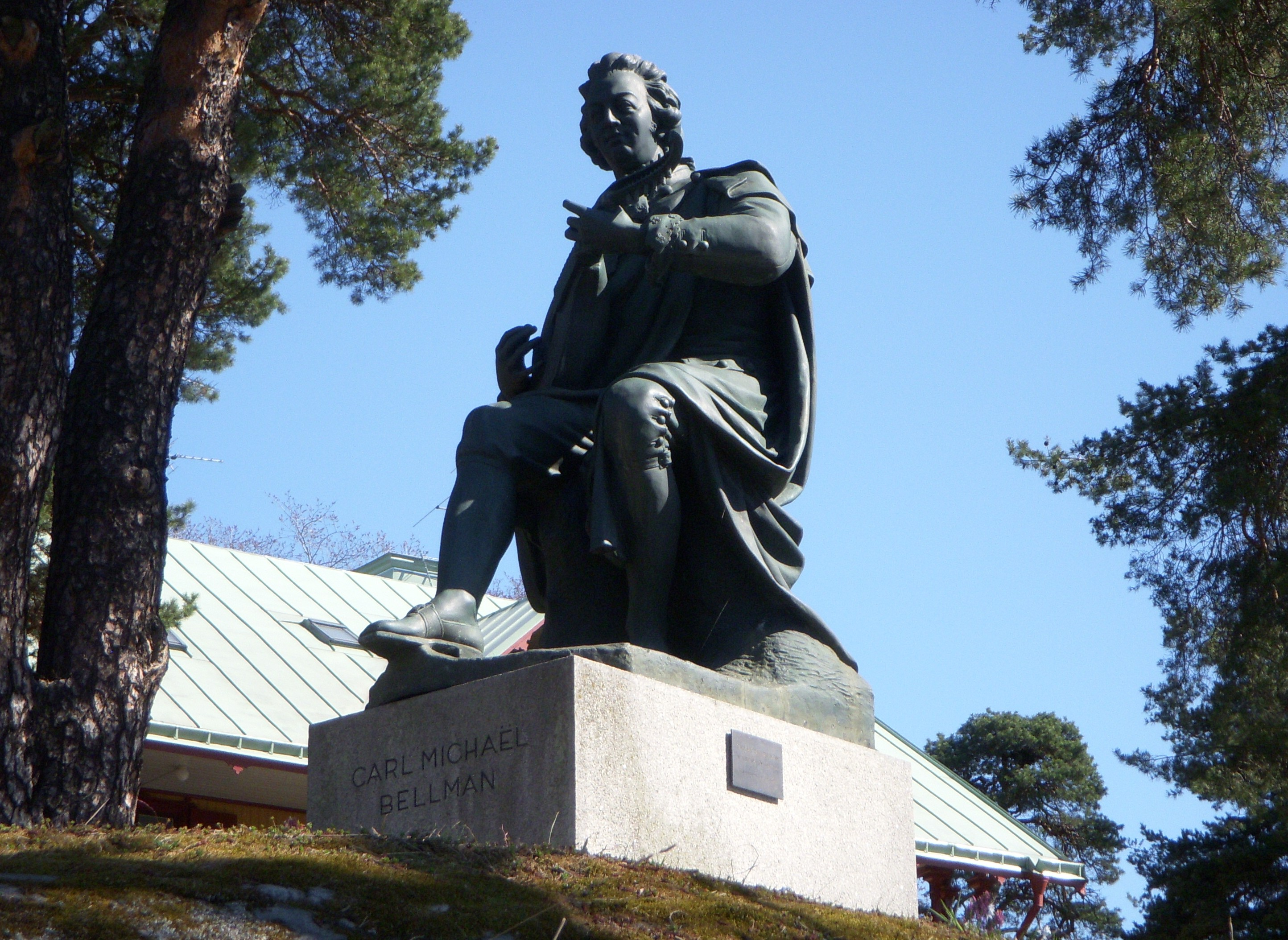 Carl Michael Bellman vid Brunnsviken, skapad av Alfred Nyström (1844-1897)